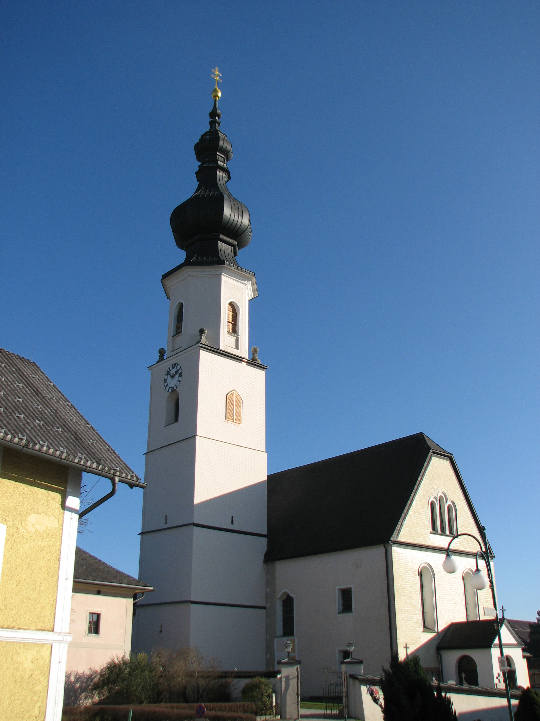 Kath. Pfarrkirche Unserer Lieben Frau Geburt